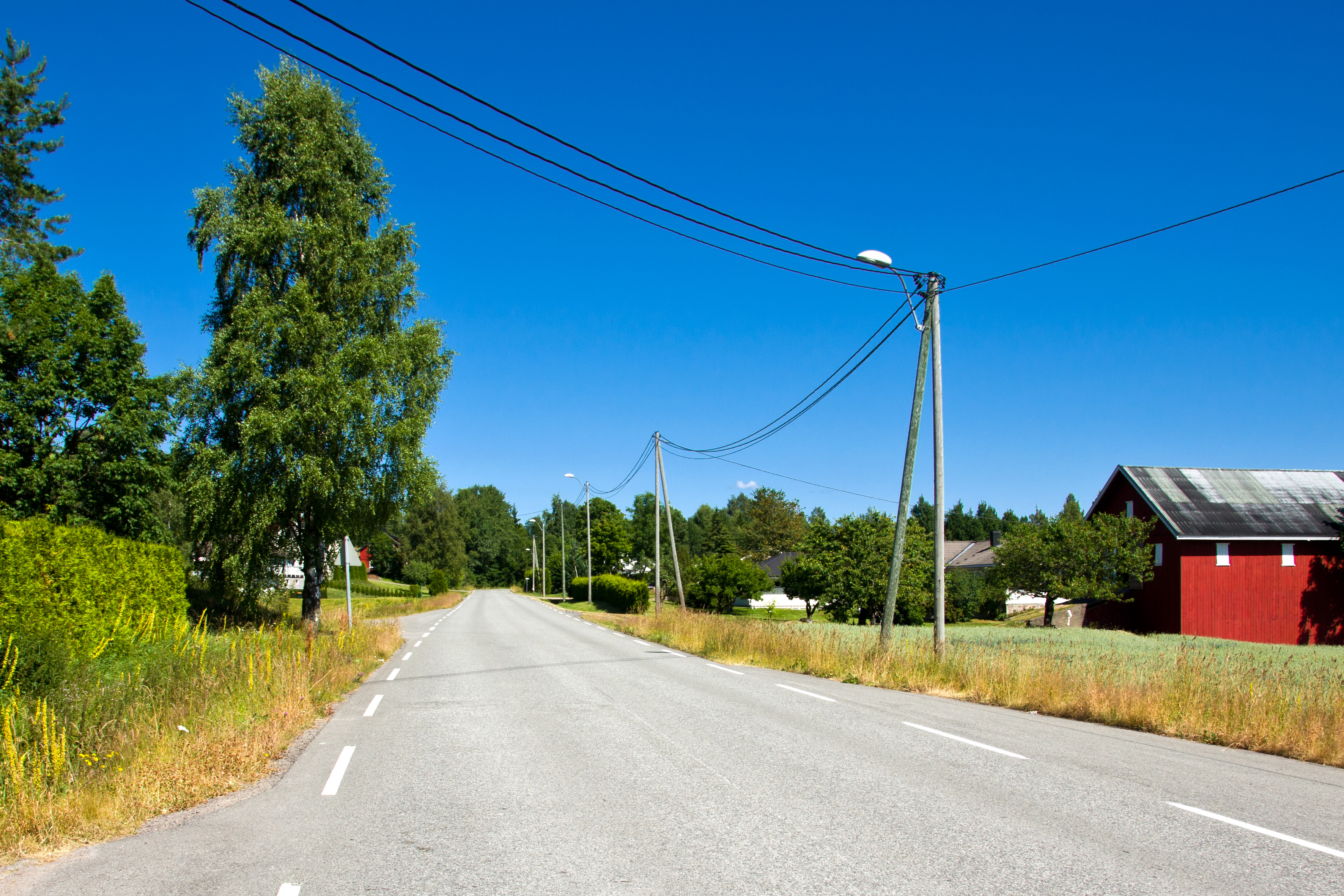 Fylkesvei 756 Gjelstadveien i Re, Vestfold